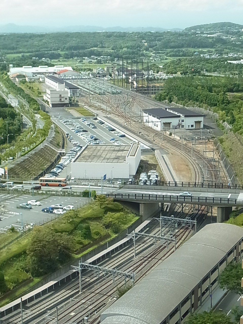 兵庫県神戸市西区糀台5丁目の神戸市営地下鉄西神車庫